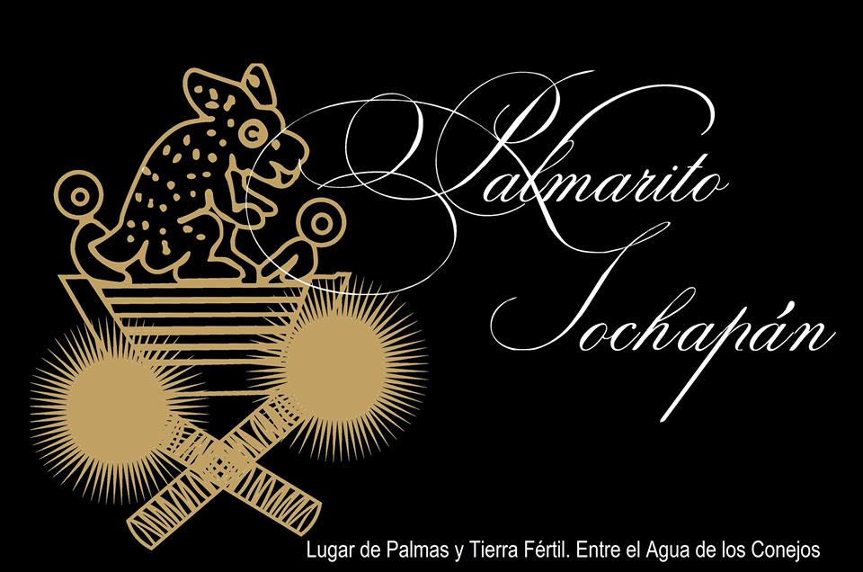 Palmarito se deriva de palma: palmas y la terminación rito: fértil. De este modo, puede referirse al “Lugar de Palmas y Tierra Fértil”. Tochapán: tochtli: conejo, Atl: agua y la posposición -pan: en, dentro, durante, por o sobre; lo cual puede definirse como “Entre el Agua de los Conejos”